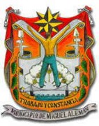 Escudo de Armas de Miguel Aleman Tamaulipas